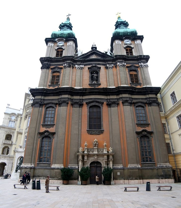 Templom